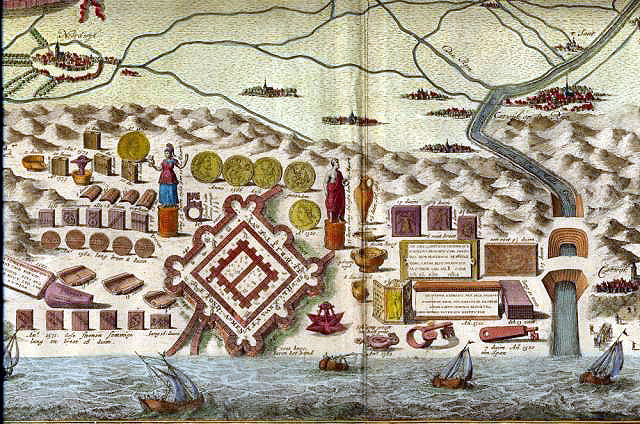 Stark interpretierender Darstellung der Grundrisse des römischen Kastells Lugdunum Batavorum auf einem Kupferstich der so genannten Brittenburg von F. Bleijswijk aus dem Jahre 1725.